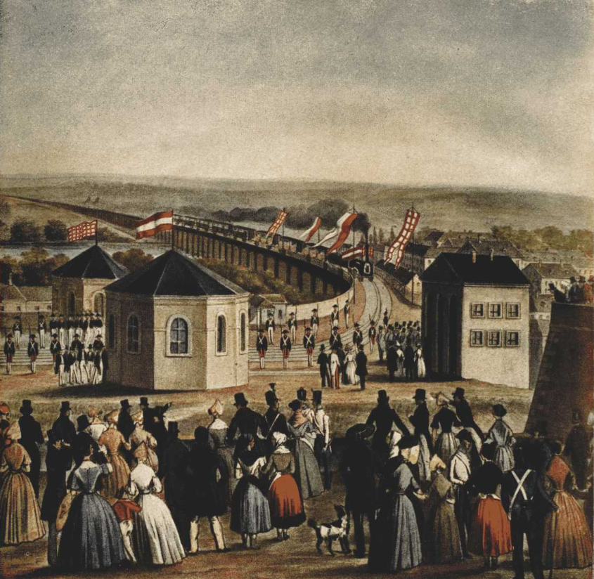 Příjezd prvního vlaku do Brna 7. července 1839. Kolorovaná litografie, výřez: Muzeum města Brna, inv. č. 2406, Leopold Müller Ringes, Vladimír, Století železnic. Dějiny dopravy na koleji, Praha 1938